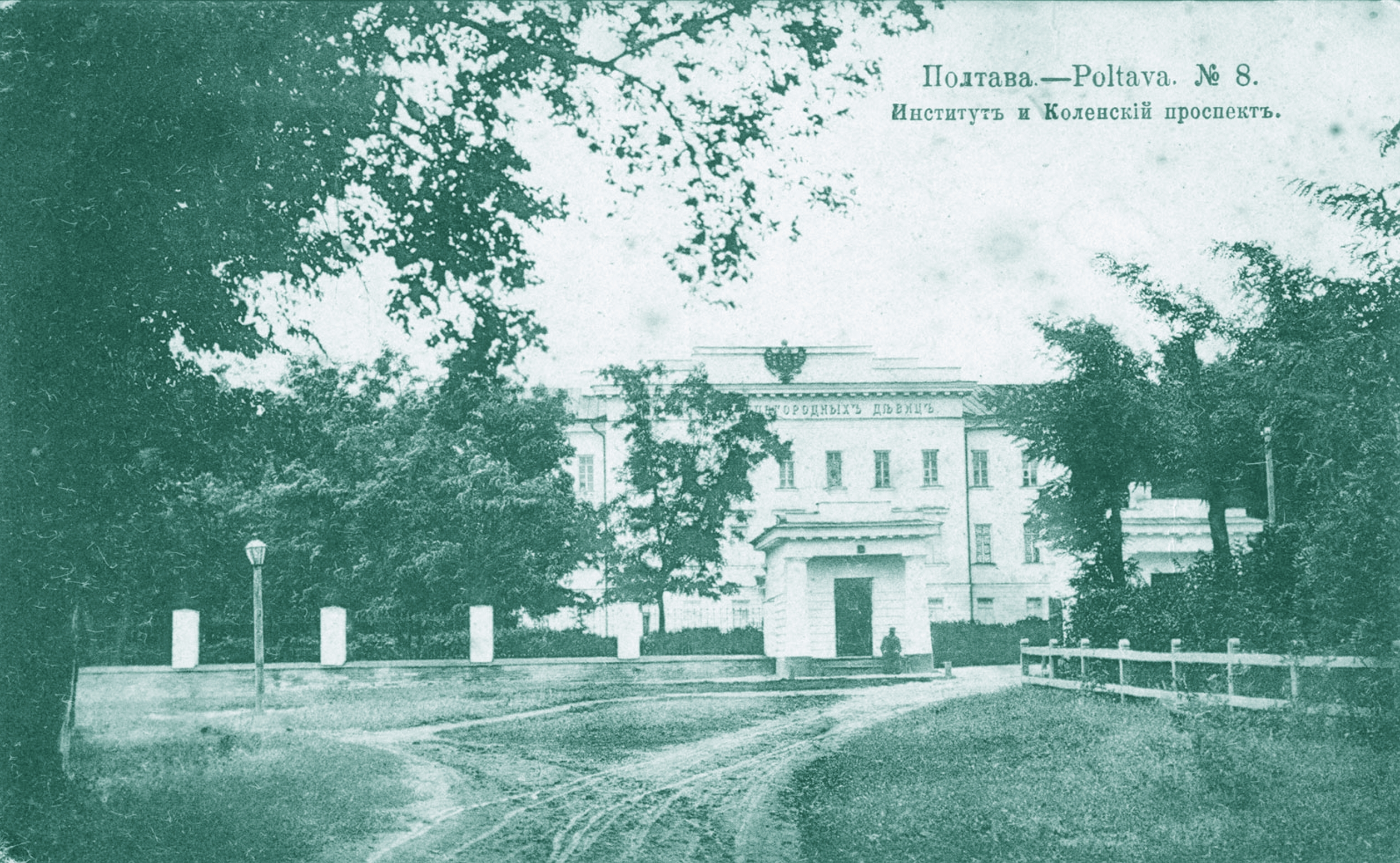 Полтава. Інститут шляхетних дівчат і Коленський проспект: Полтава. Інститут шляхетних дівчат і Коленський проспект Poltava. Institute for Noble Maidens and Kolenski Avenue Poltava. Institut pour jeunes filles nobles et Kolenski Avenue